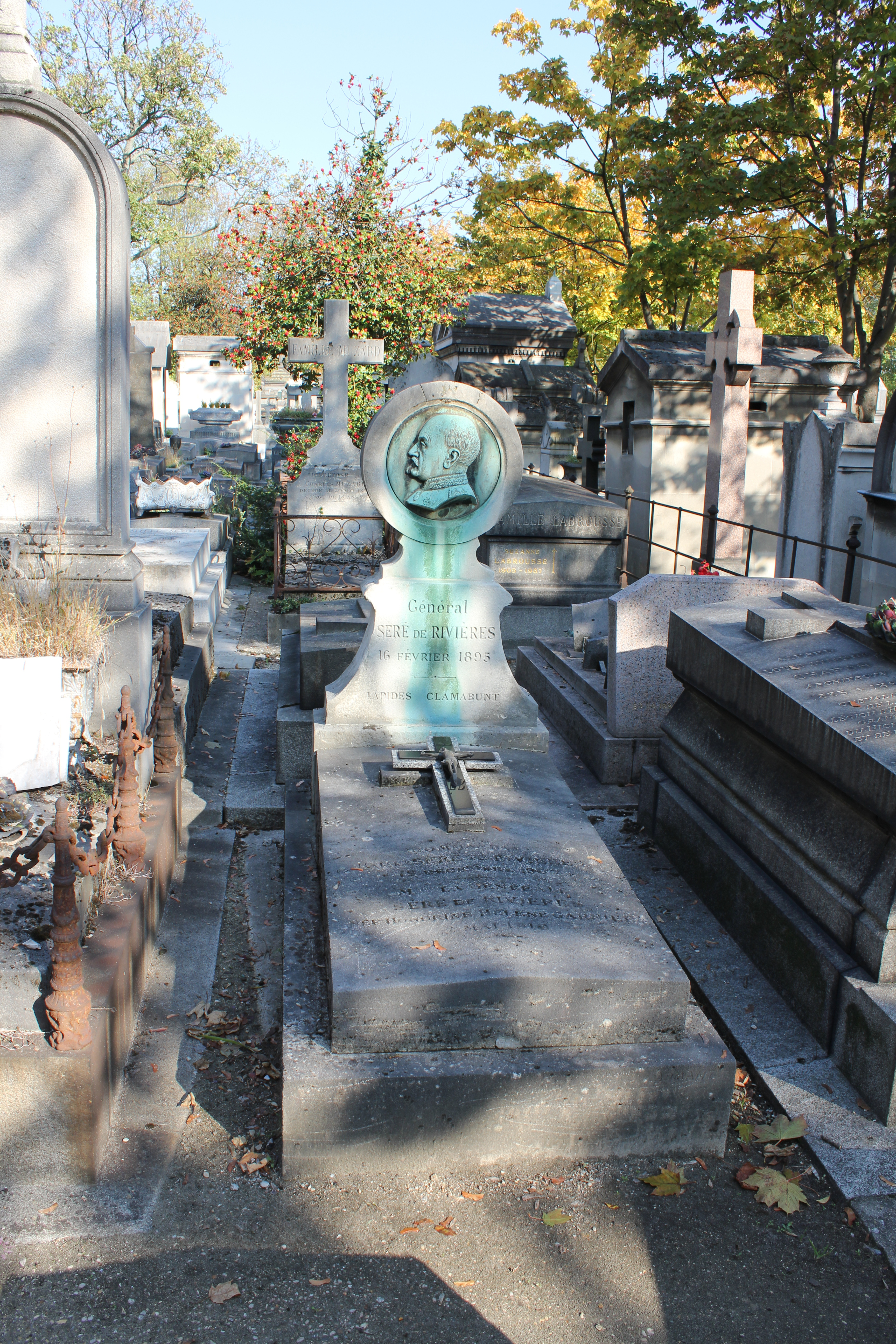 Sépulture de Raymond Adolphe Séré de Rivières (1815-1895), ingénieur militaire et général français connu pour son système complet de fortifications construit après la guerre de 1870. Tombe ornée d'un médaillon en bronze de Raymond Séré de Rivières par Mercié.vue générale, face avant